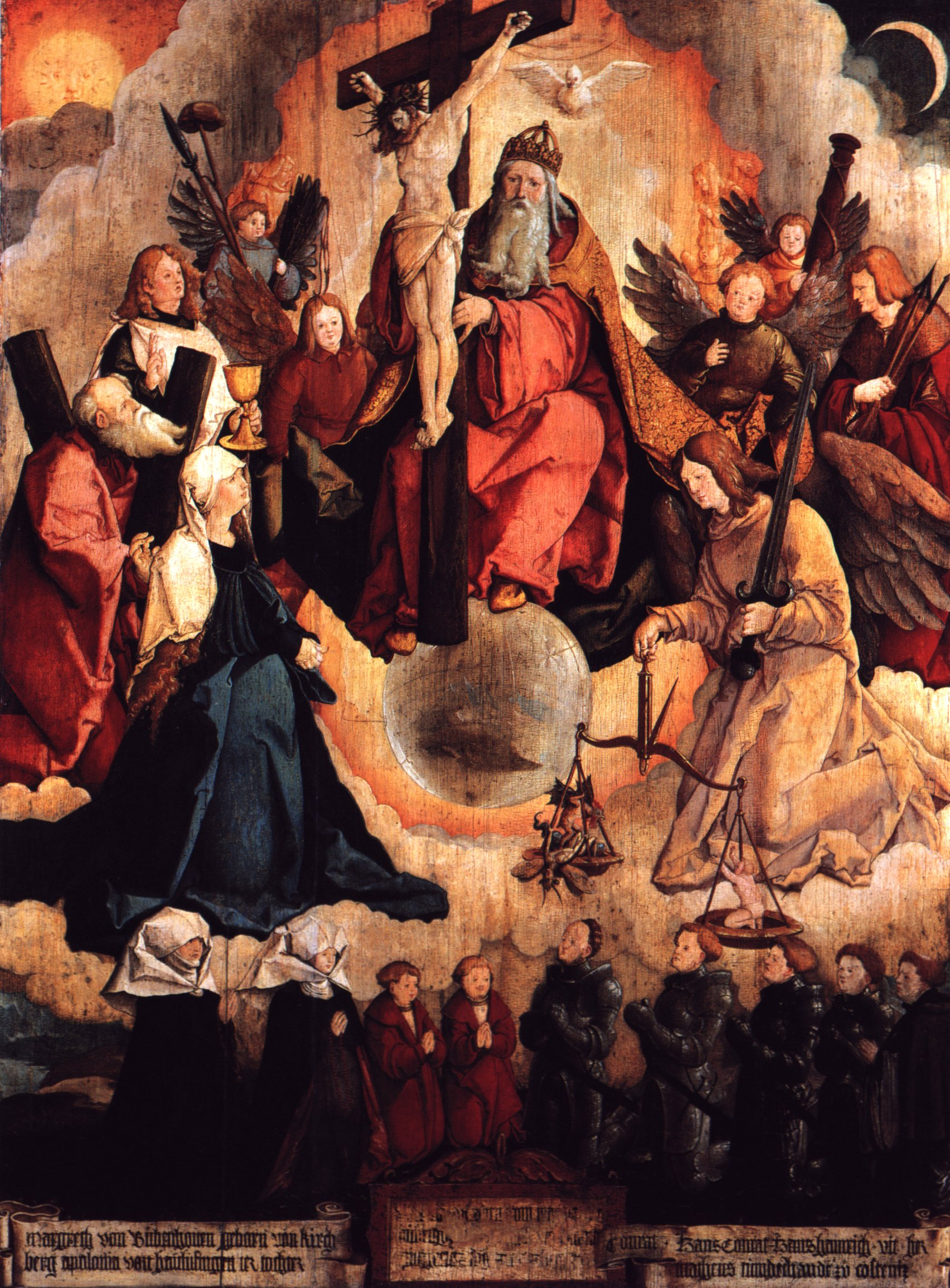 Epitaph für die Familie der Ritter von Bubenhofen; von links nach rechts: Margarethe von Klingenberg (falsch als Kirchberg beschriftet), deren Tochter Apollonia von Hailfingen (nicht Haichifingen), zwei Knaben in roten Mänteln (entweder Kinder Apollonias, oder früh verstorbene Kinder Margarethes und Konrads, Konrad von Bubenhofen, die Söhne, Hans Konrad (dieser ist aber urkundlich nicht nachgewiesen, also evt früh verstorben. Weshalb er sich in der Darstellung dann aber von den roten Knaben unterscheidet ist nicht ersichtlich), Hans-Heinrich und Veit, sowie der mit Tonsur dargestellte Konstanzer Domdekan Matthäus von Bubenhofen. Der zentrale Teil der Inschrift wurde unkenntlich gemacht.